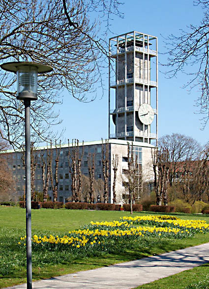 Århus Rådhus, Denmark